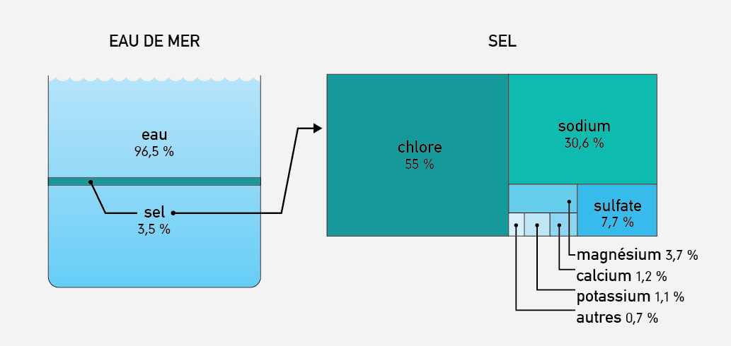 Composition du sel de mer